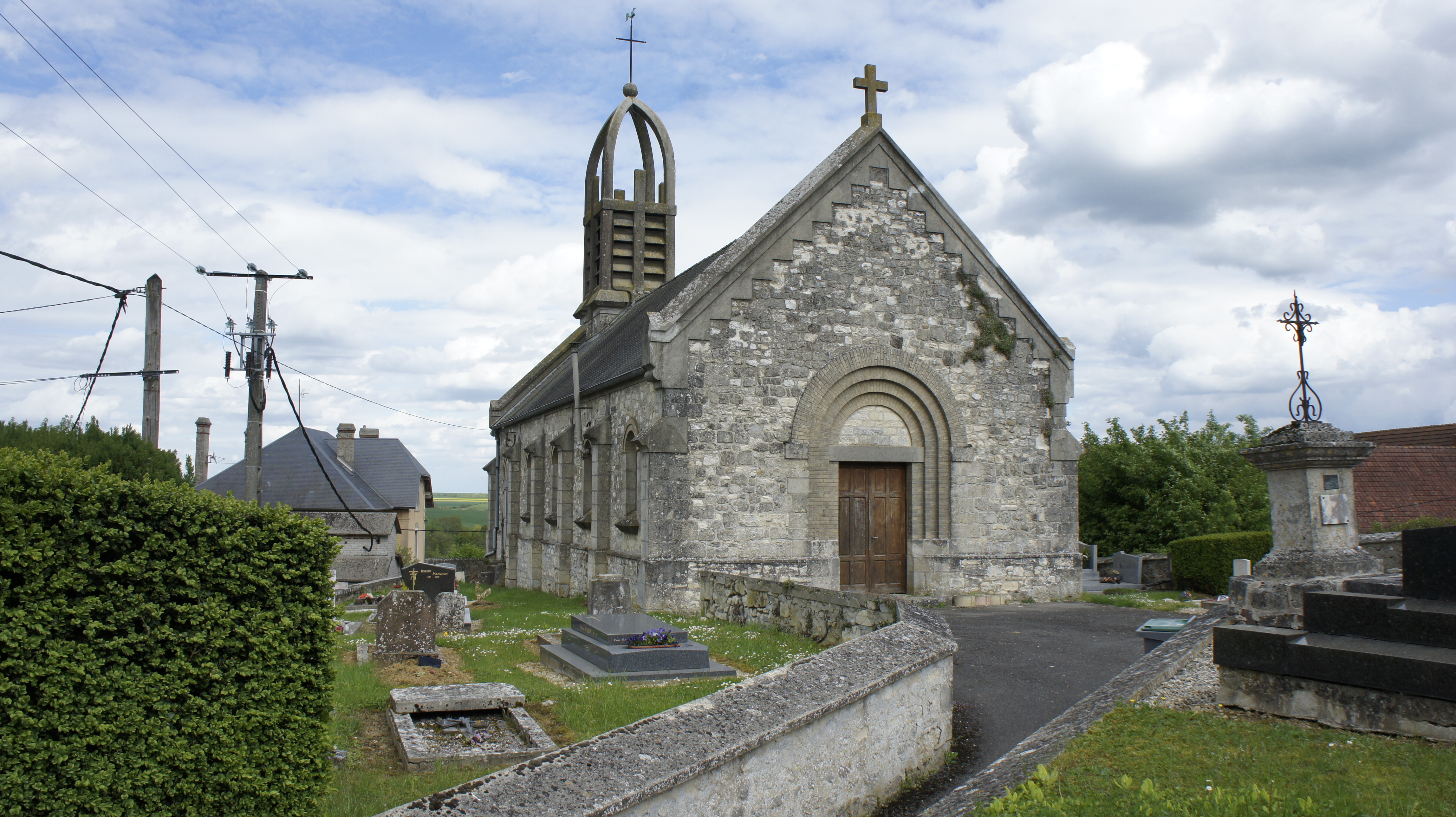 Vue de l'église .